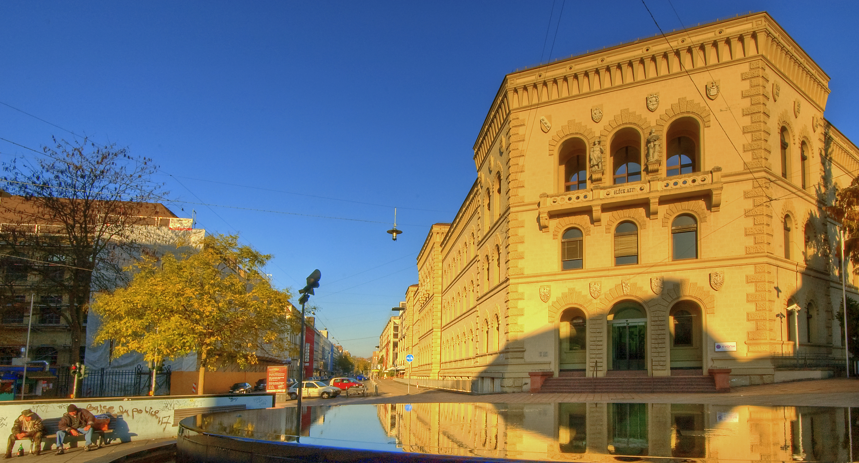 Klick here for a large view! Saarbrücken, Reichsstraße